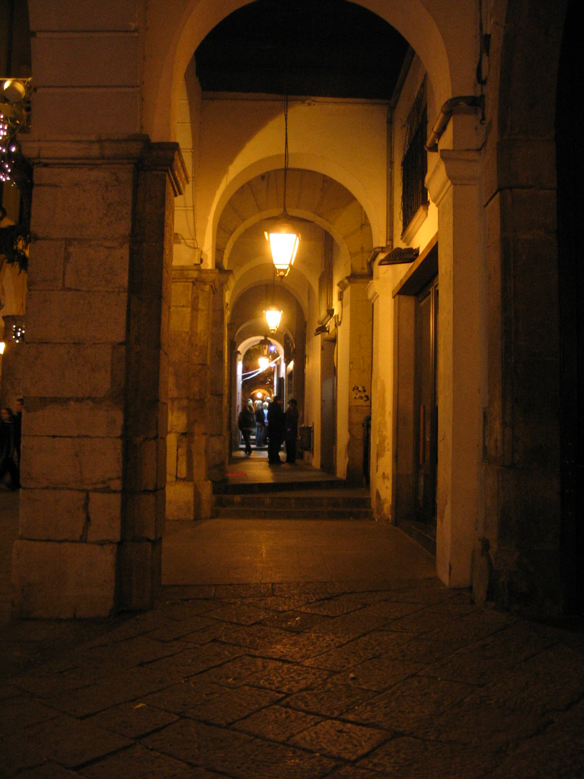 I Portici di Cava de'Tirreni (Borgo Scacciaventi)